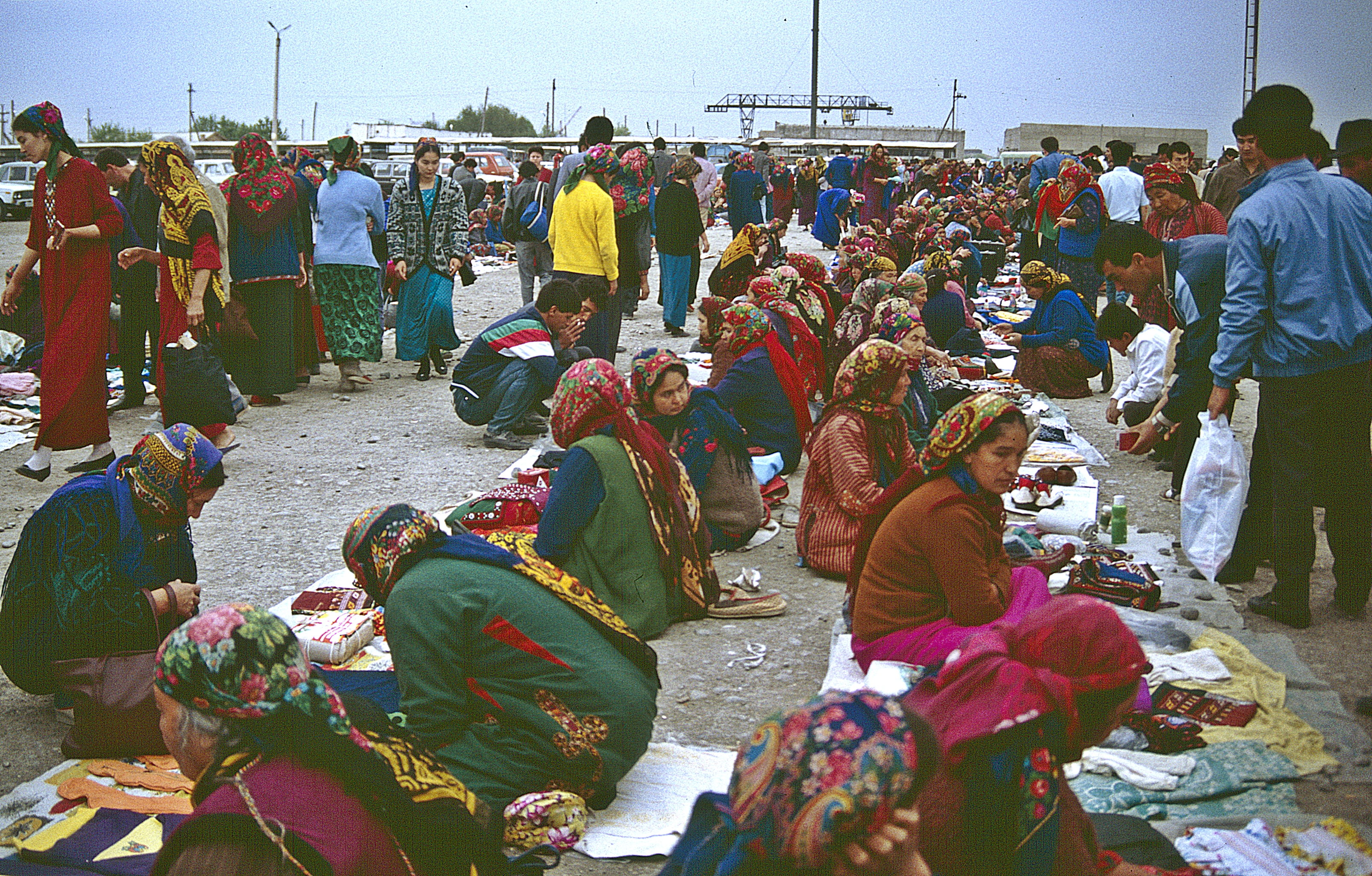 Mary, Turkmenistan: Markt